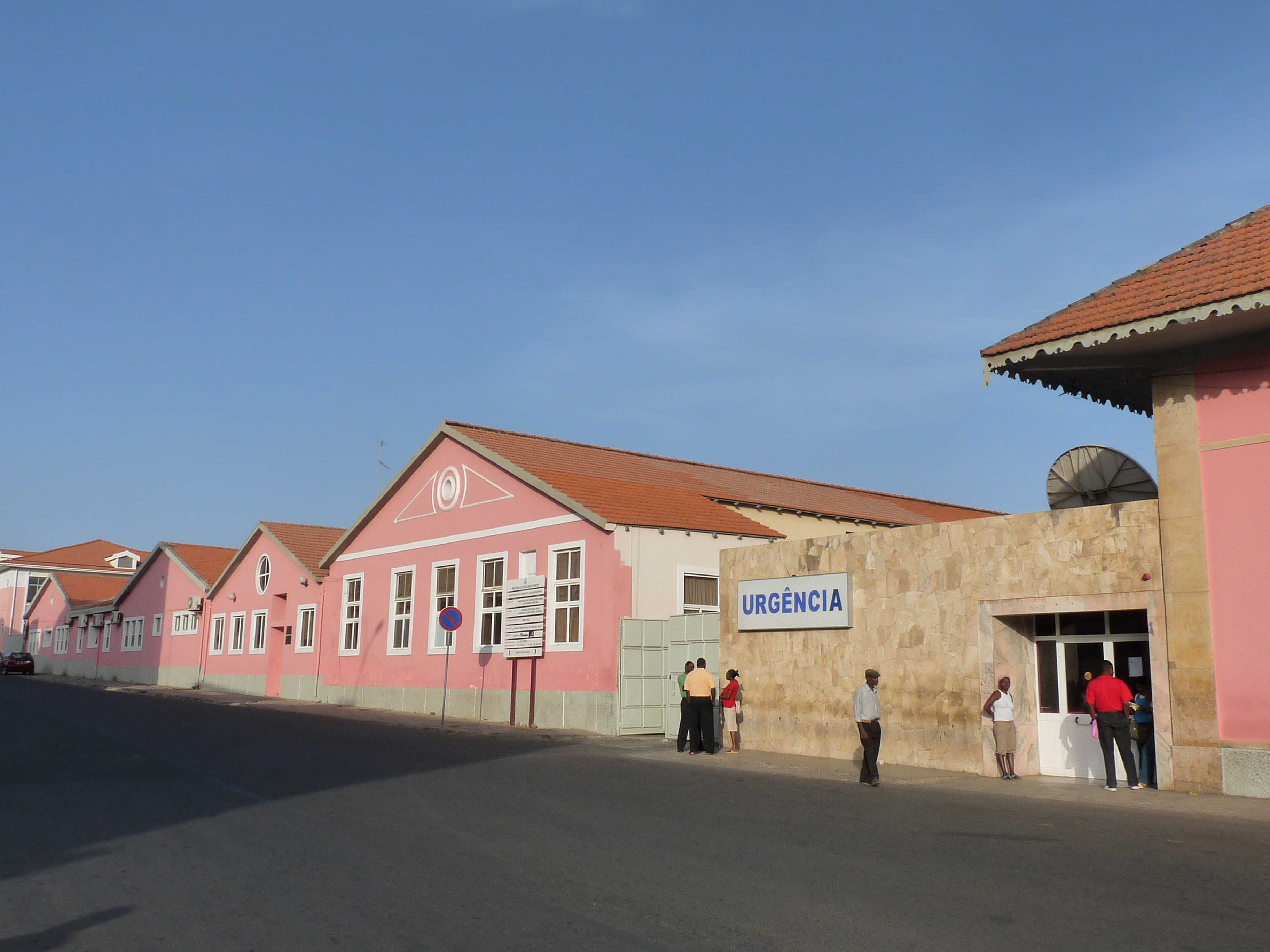 Hôpital Agostinho Neto (Praia, Cap-Vert)